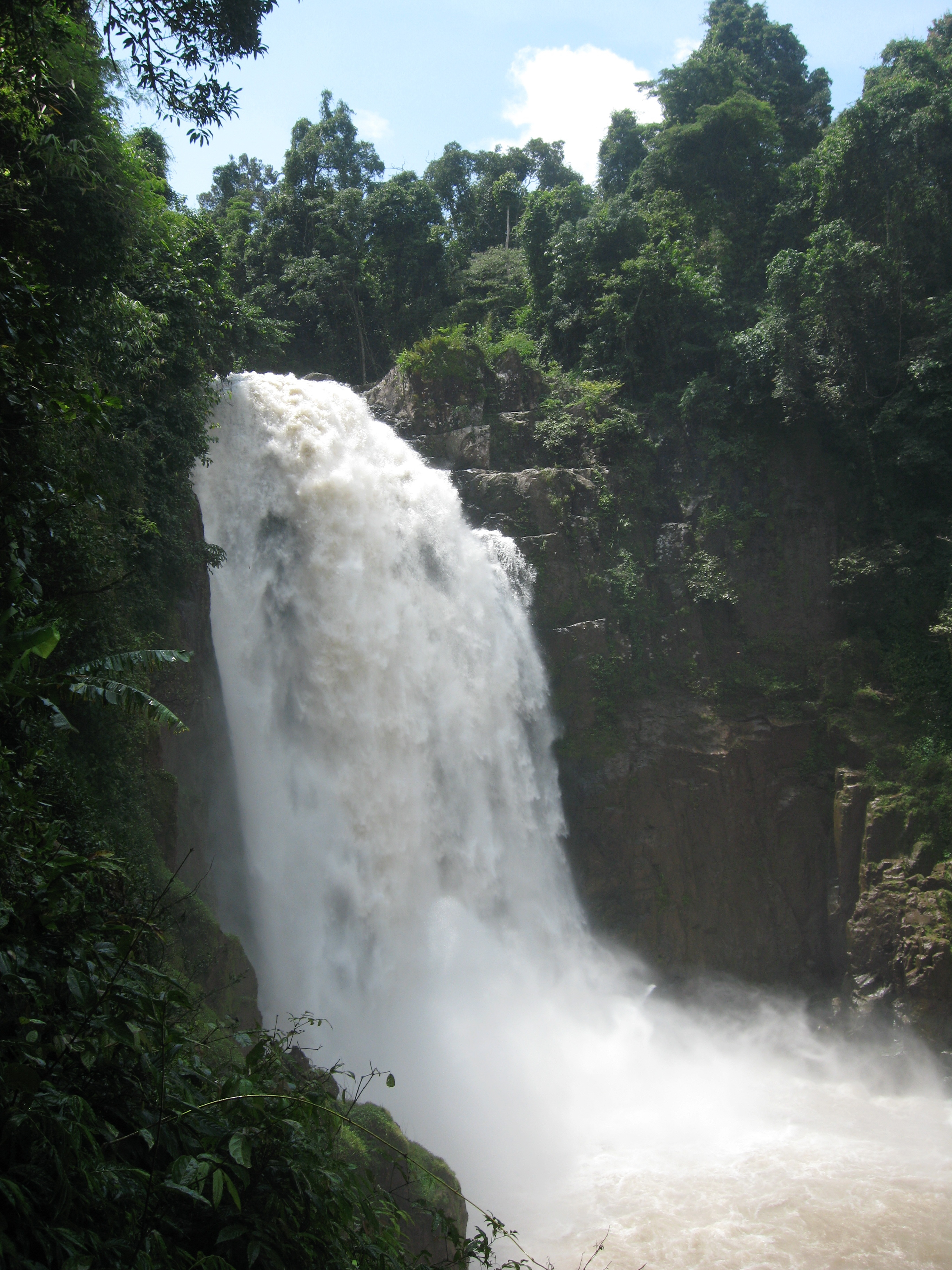 น้ำตกเหวนรก